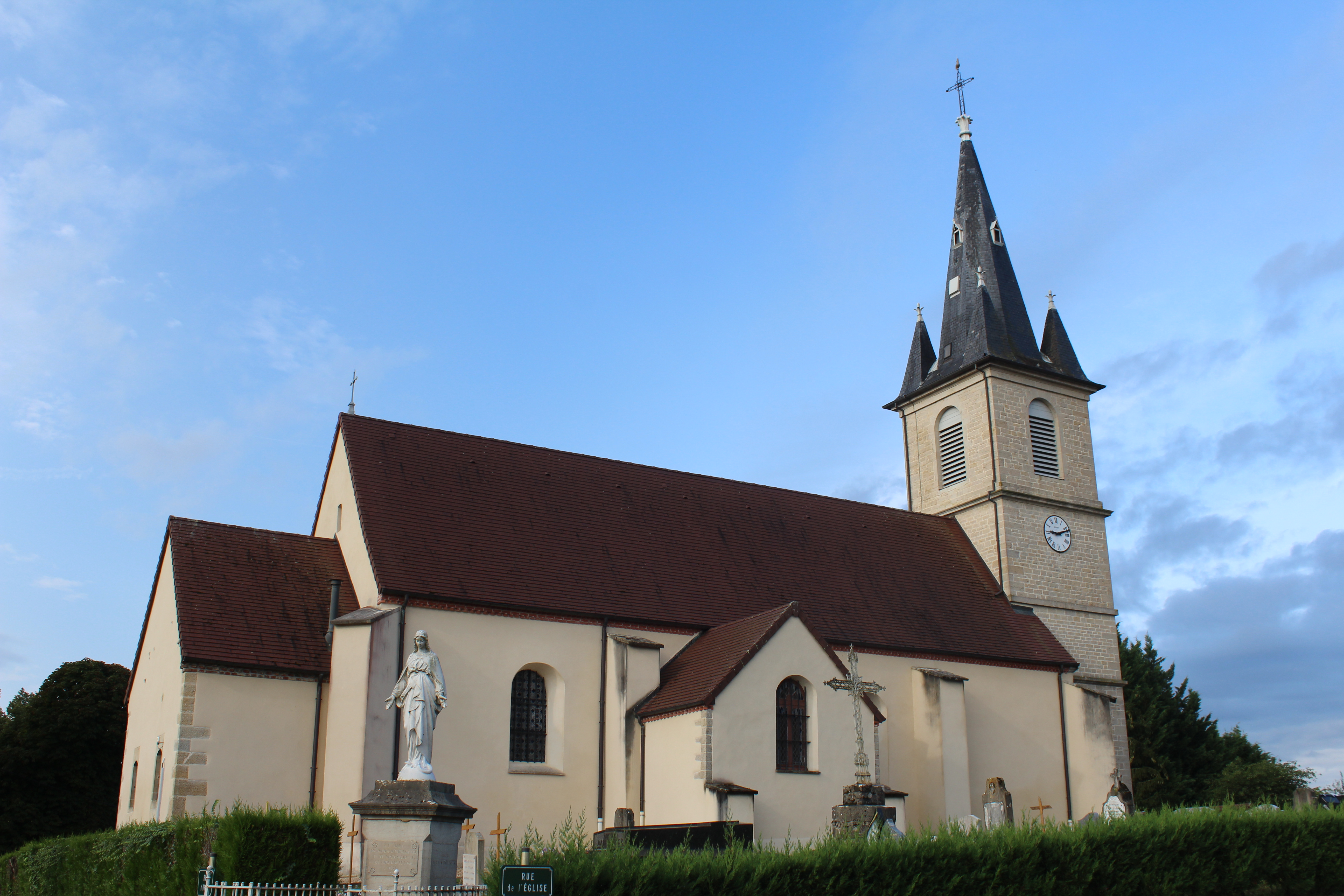 Église Saint-Valérien de Nance, Jura.